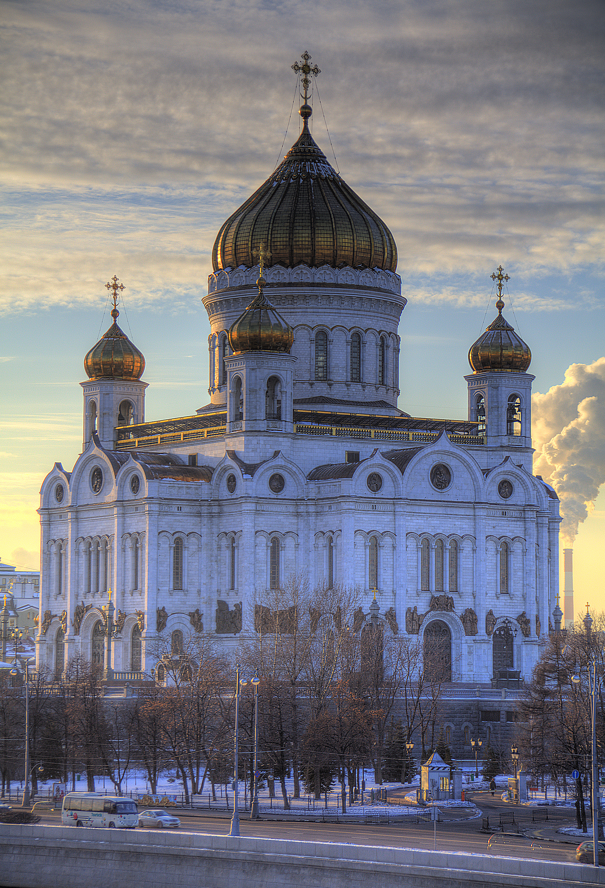 Храм Христа спасителя. Река Москва.